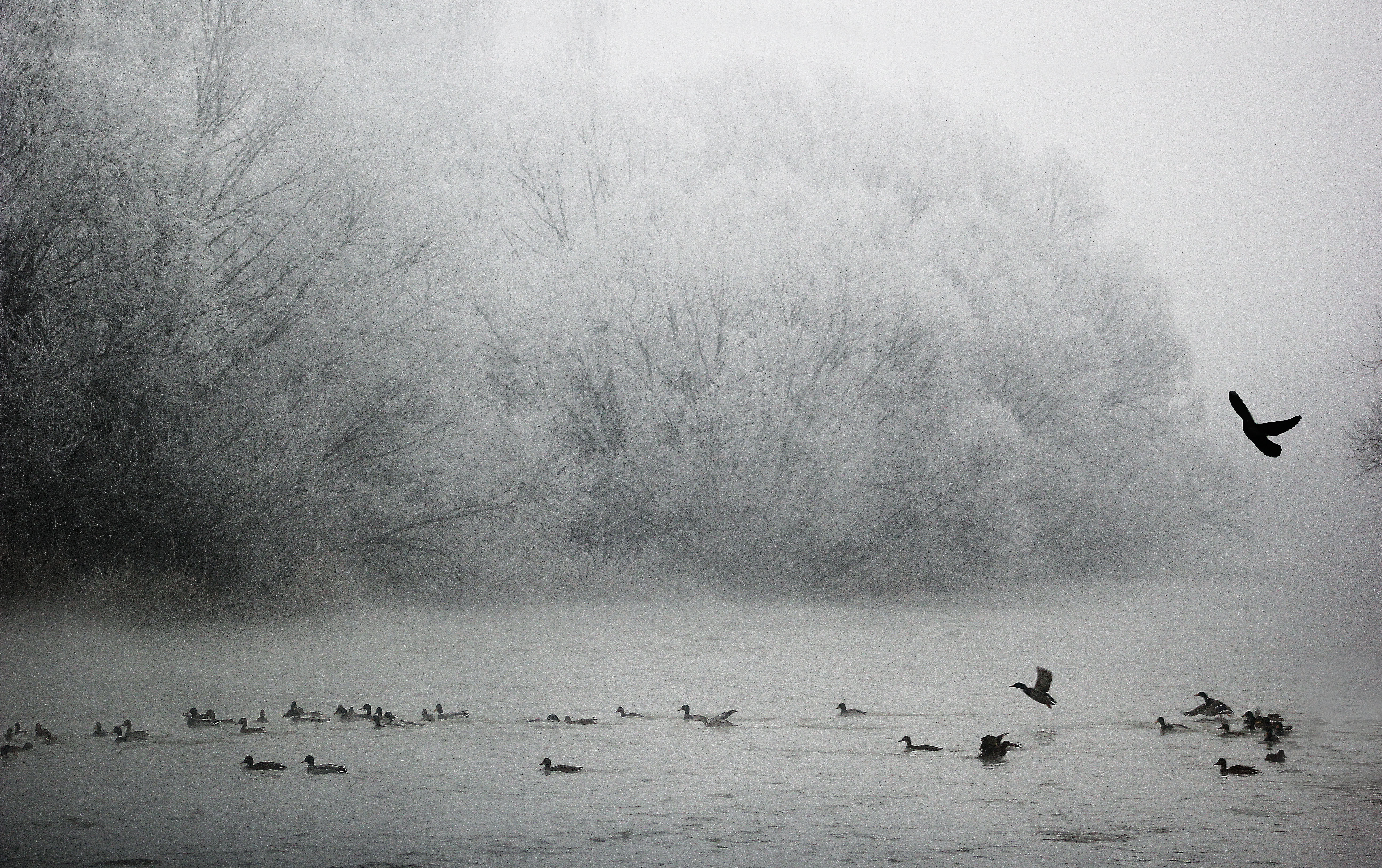 Pamje e shotave nën urën e lumit Ibër në Mitrovicë gjatë një dite me mjegull